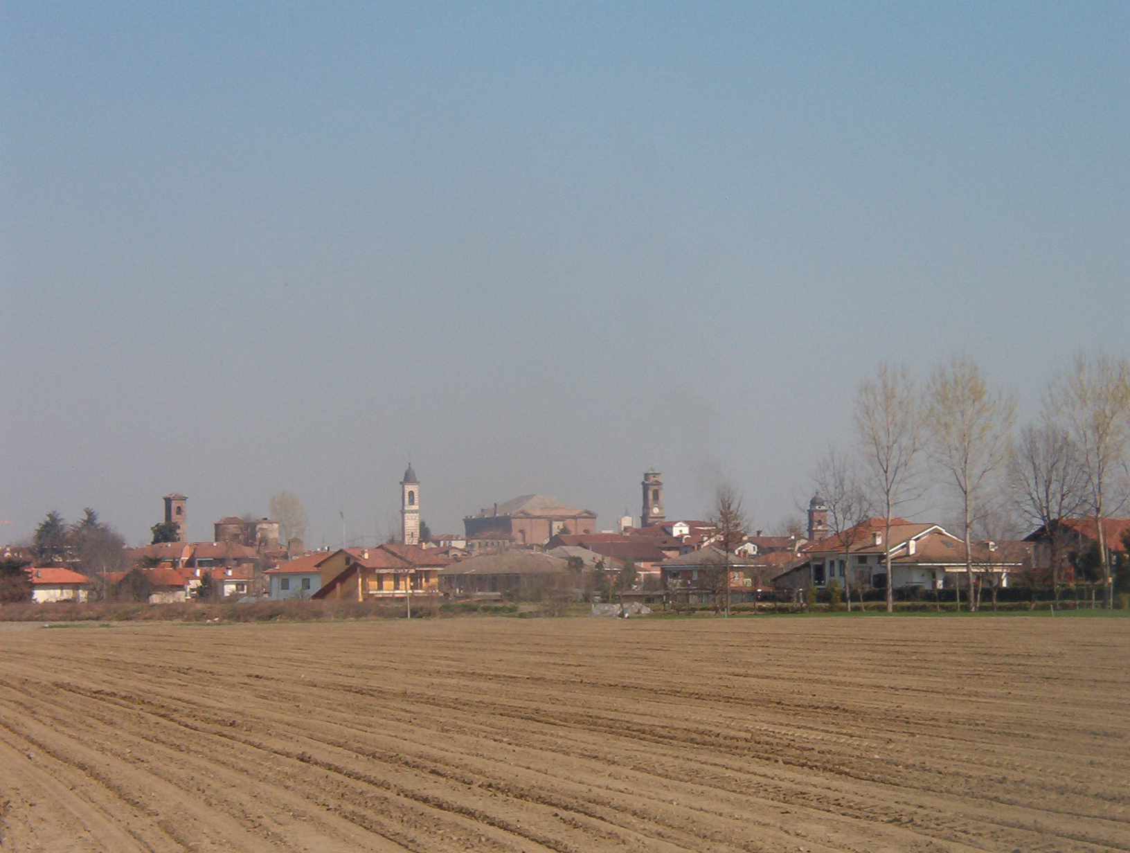 Vigone, provincia di Torino, Italia